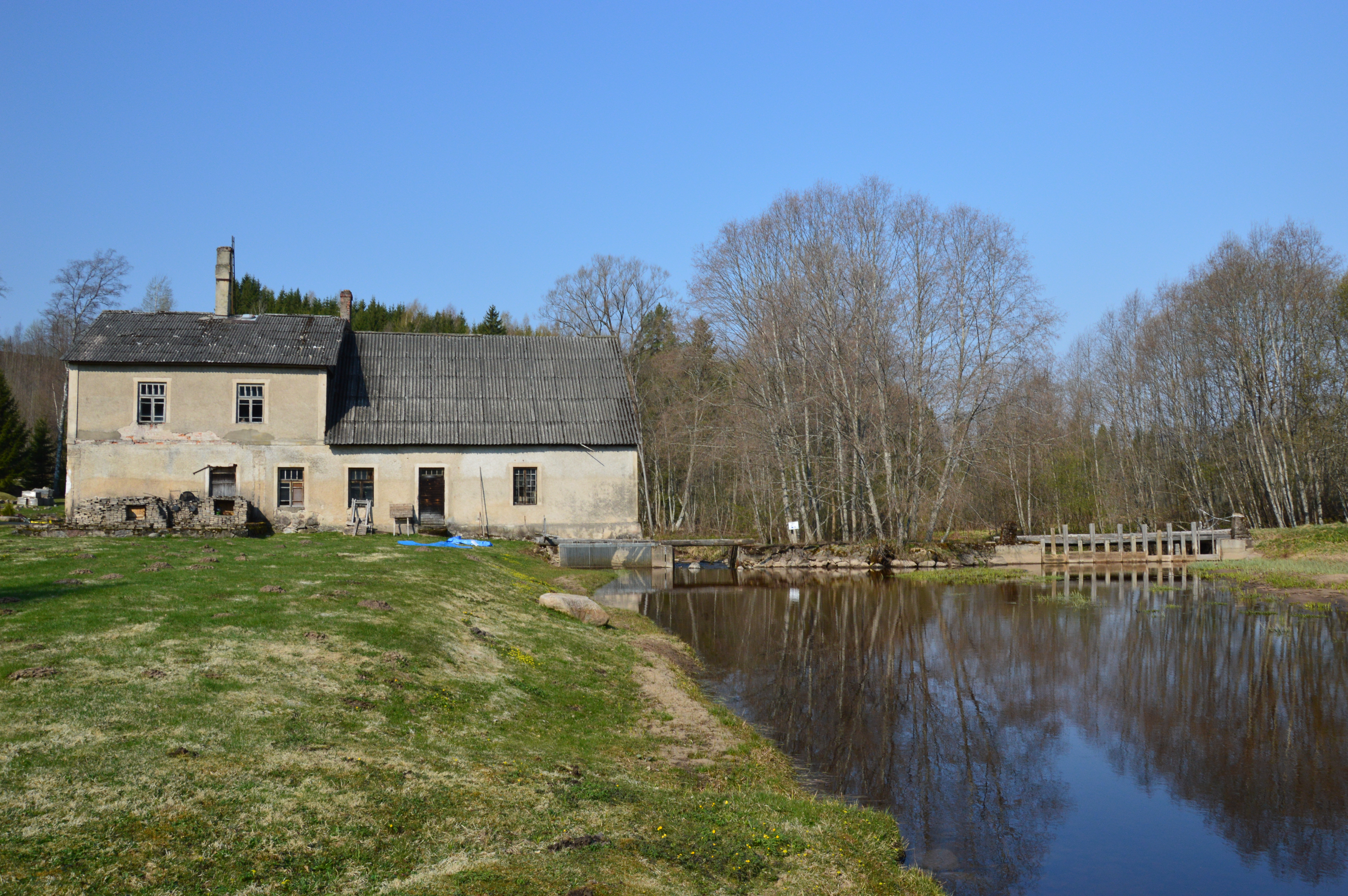 Kaugu veski ja Pärlijõgi